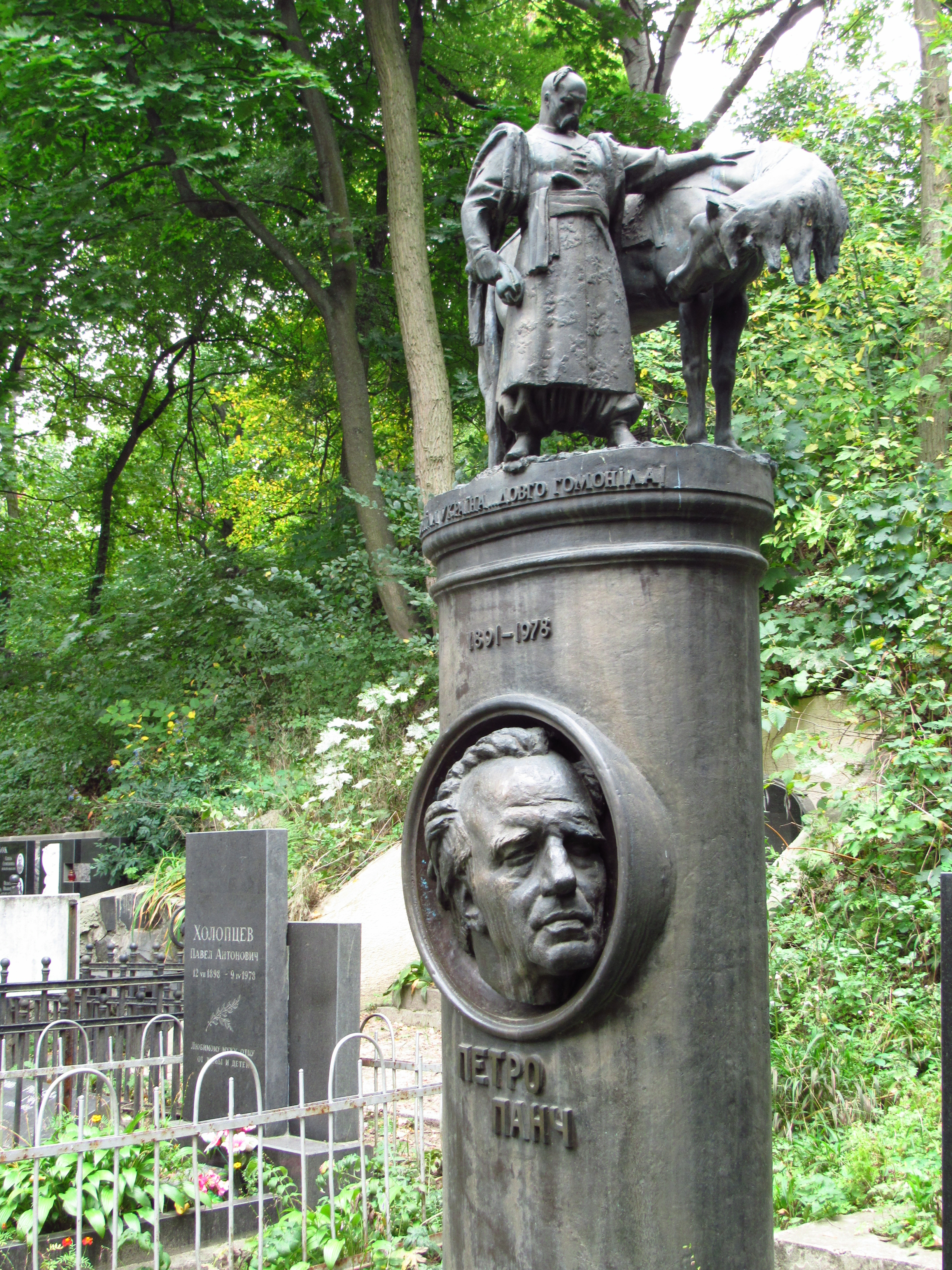 Могила письменника П. Й. Панча, Київ, Байкова вул., 6, діл. 43